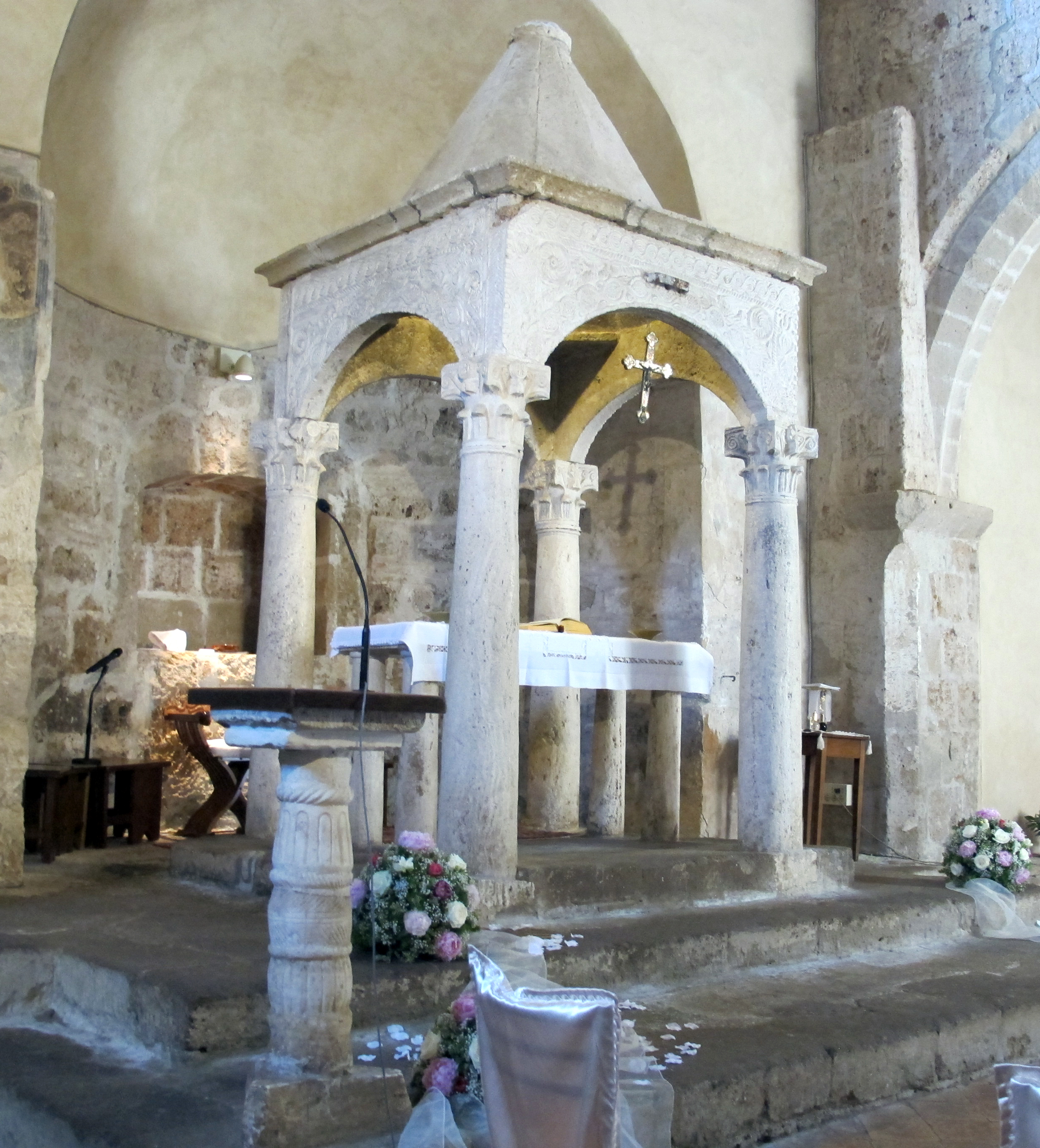 Sovana